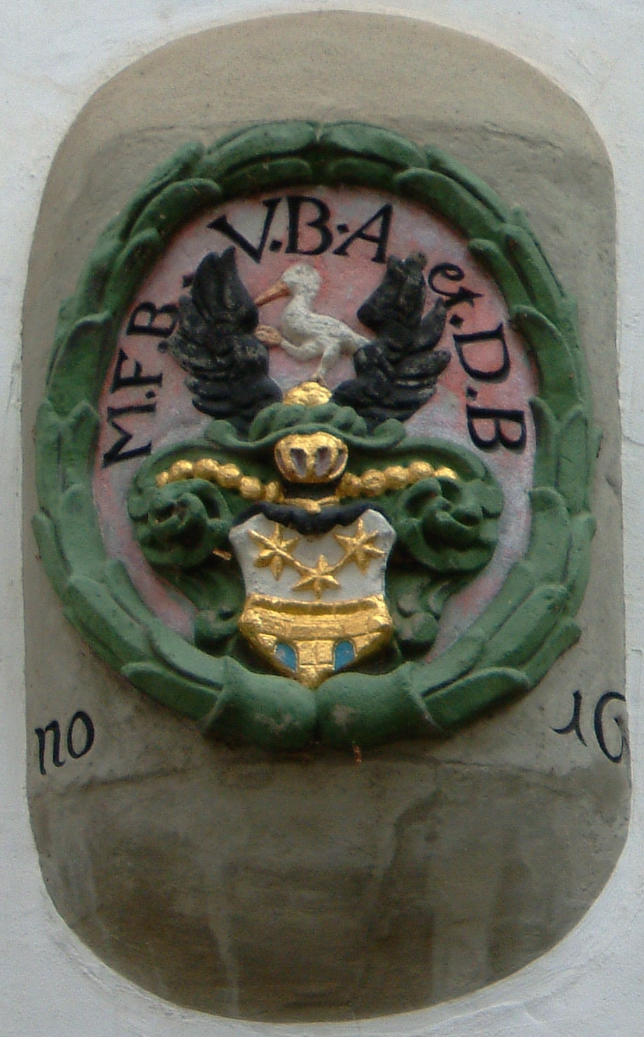 Domstift Bautzen Detail im Hof